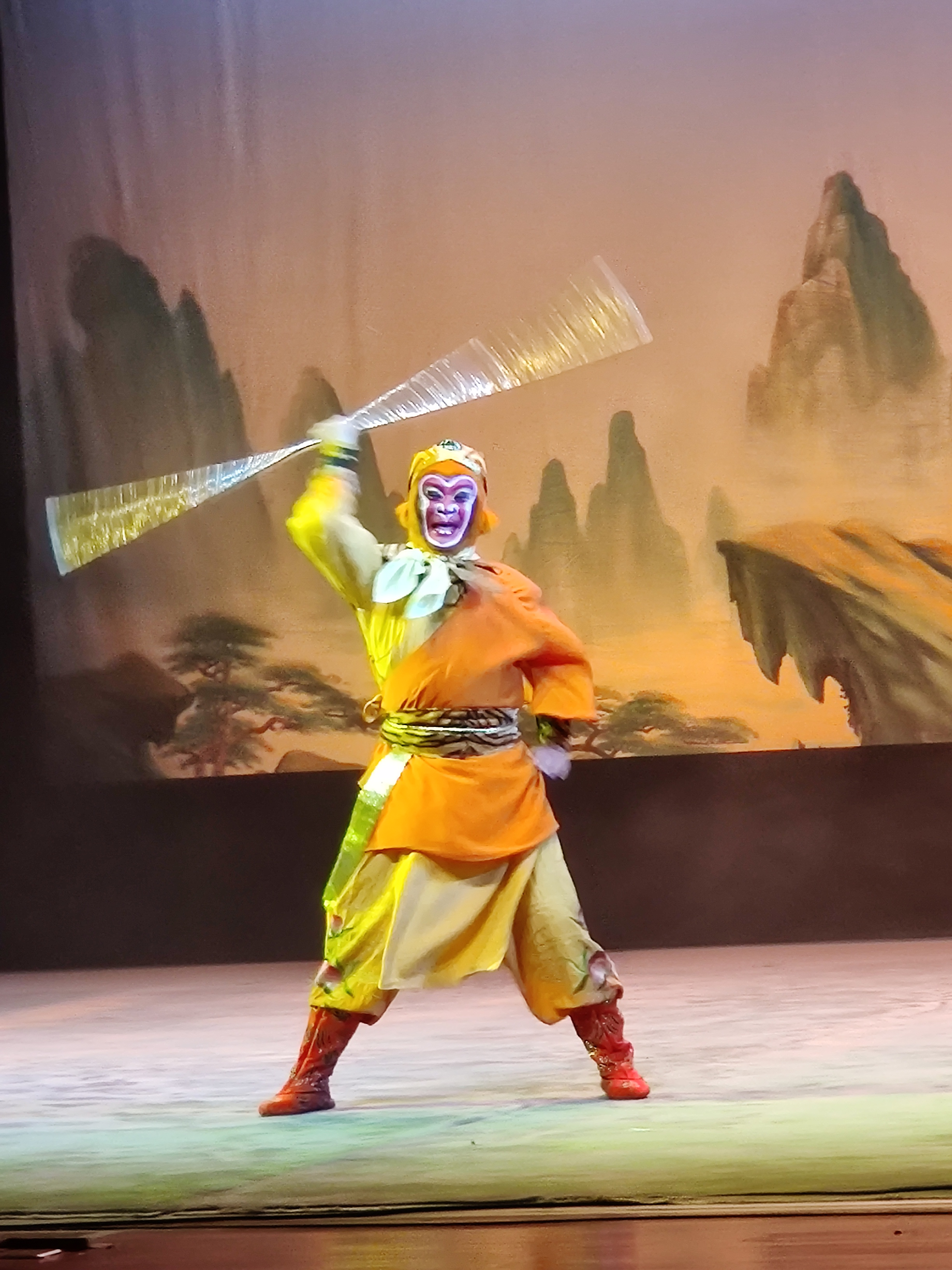 中文（中国大陆）: 孙悟空上场。孙悟空——刘建杨